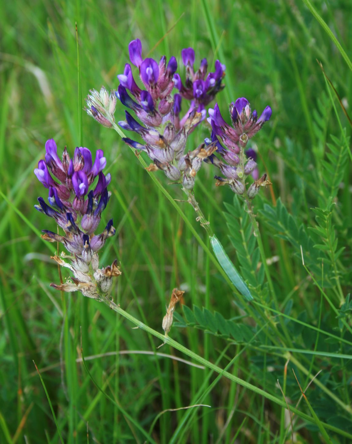 Blasen-Tragant (Astragalus vesicarius subsp. carniolicus), Schmetterlingsblütler (Faboideae), Hülsenfrüchtler (Fabaceae) - Slowenien/Slovenija/Slovenia: Primorska, "Prärie" NNW Praproče